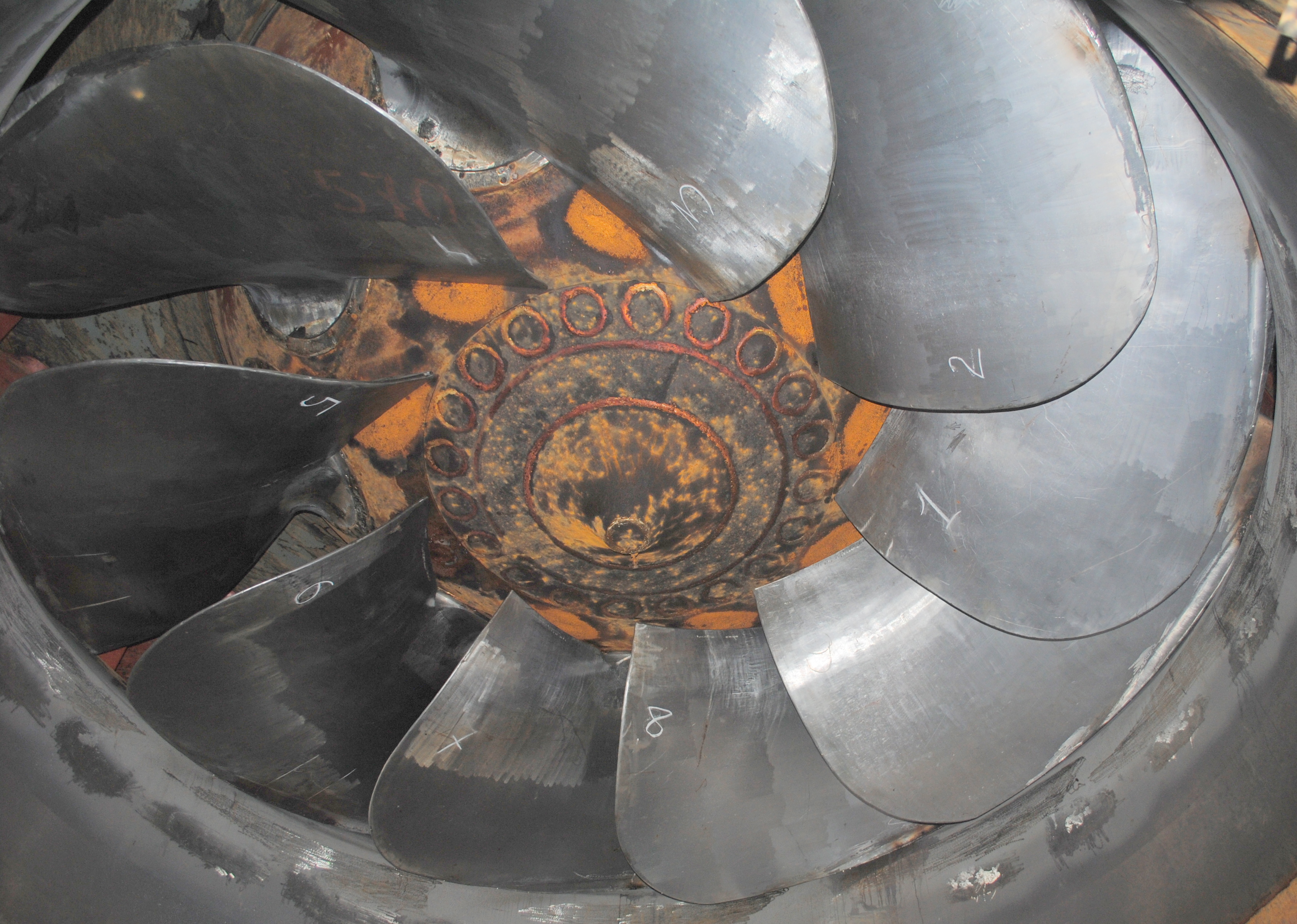 Диагональная турбина Колымской ГЭС